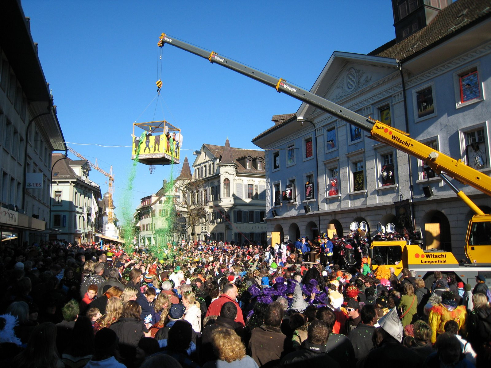 Traditionelle Fasnachtseröffnung in Langenthal